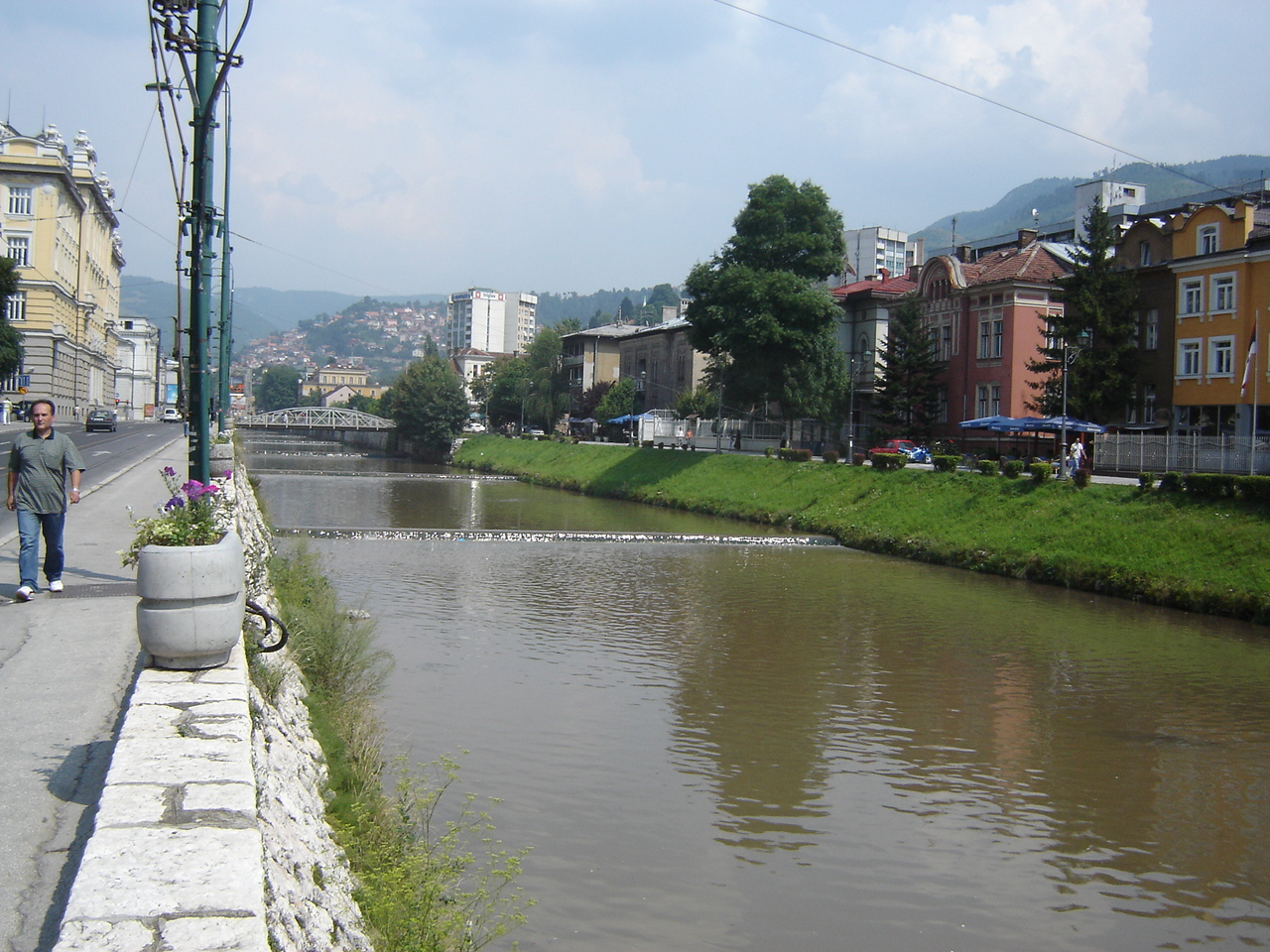 The Miljacka River in Sarajevo